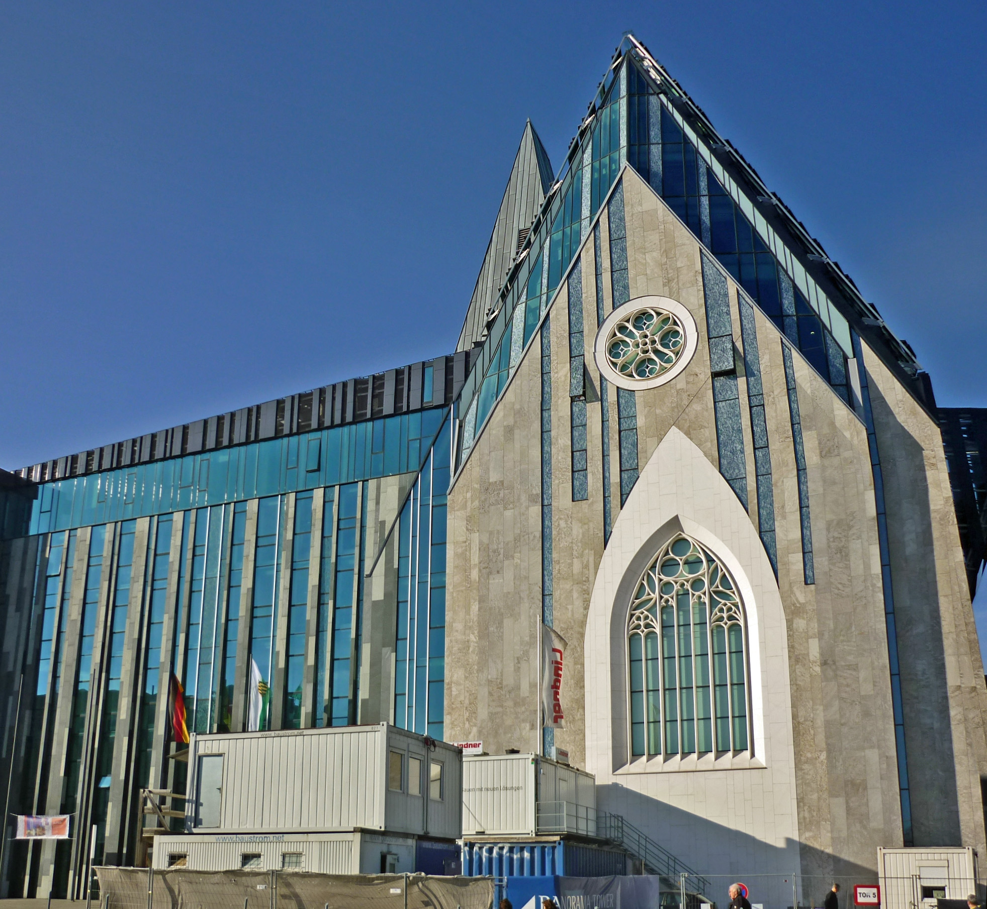 Paulinum in Leipzig (noch im Bau)